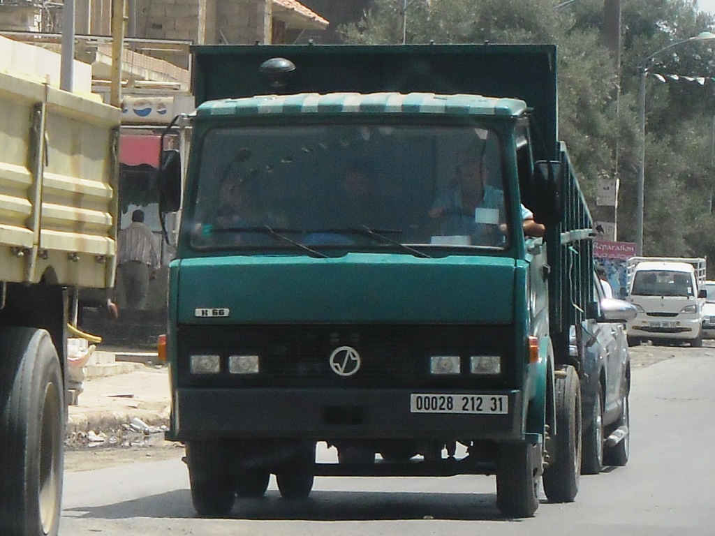 K شاحنة سوناكوم الفئة